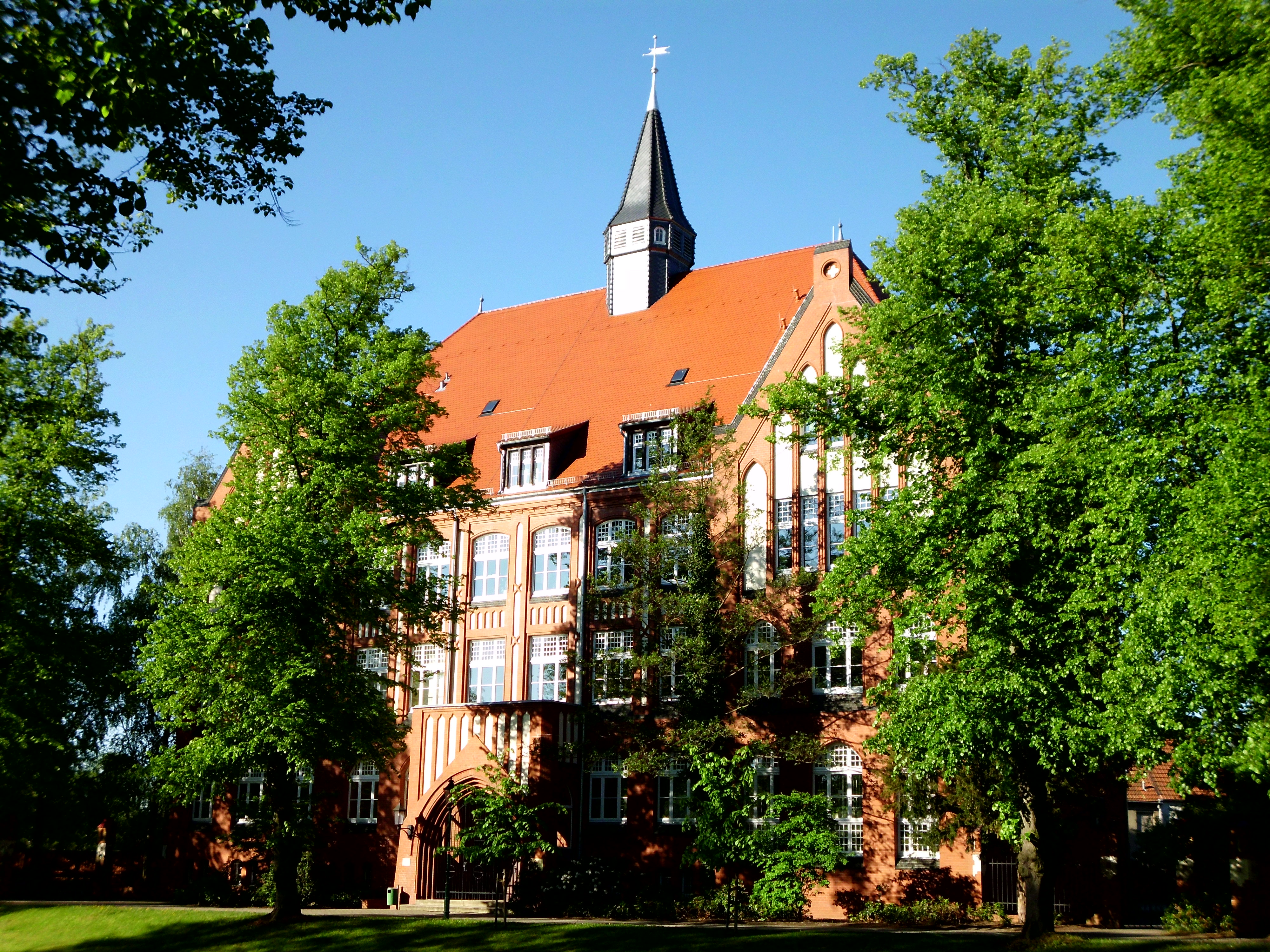 Die Schule an der Stepenitz (auch: Schule an der Buhne) ist eine Schule mit dem Förderschwerpunkt Lernen in Perleberg, Prignitz. Sie diente war früher ein Lyzeum und beherbergte kurzzeitig auch das städtische Museum.